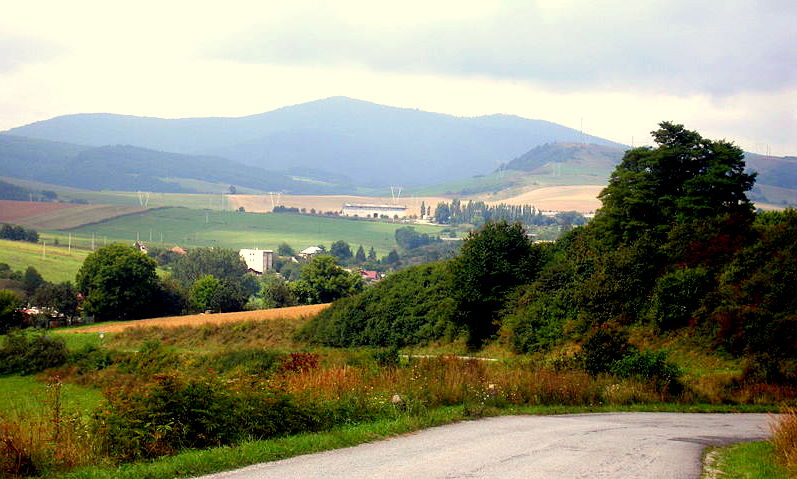 Obec Sedlice pri Prešove. Vjazd zo smeru od Prešova.